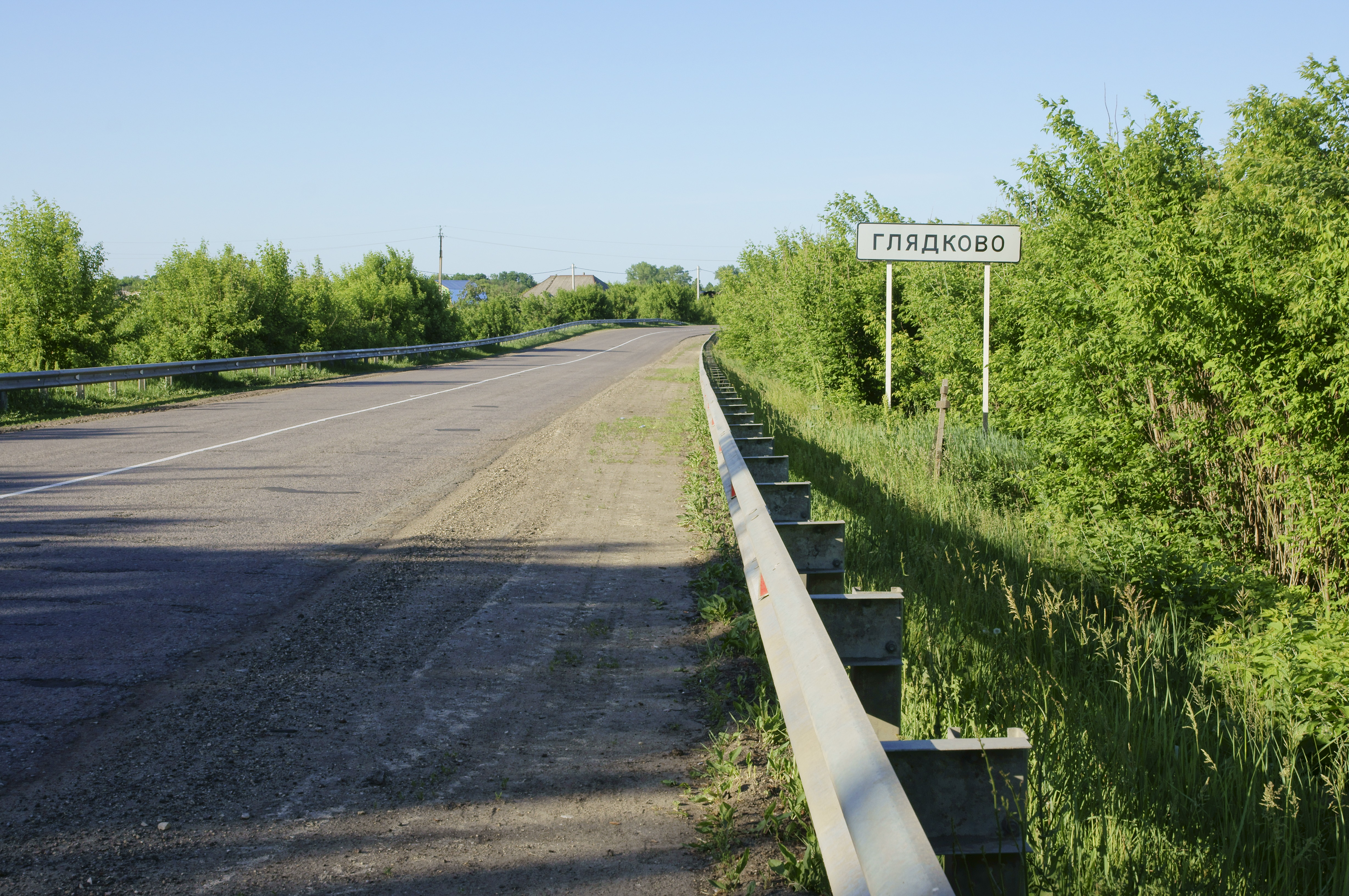 Село Глядково, Сасовский р-н, Рязанской обл.